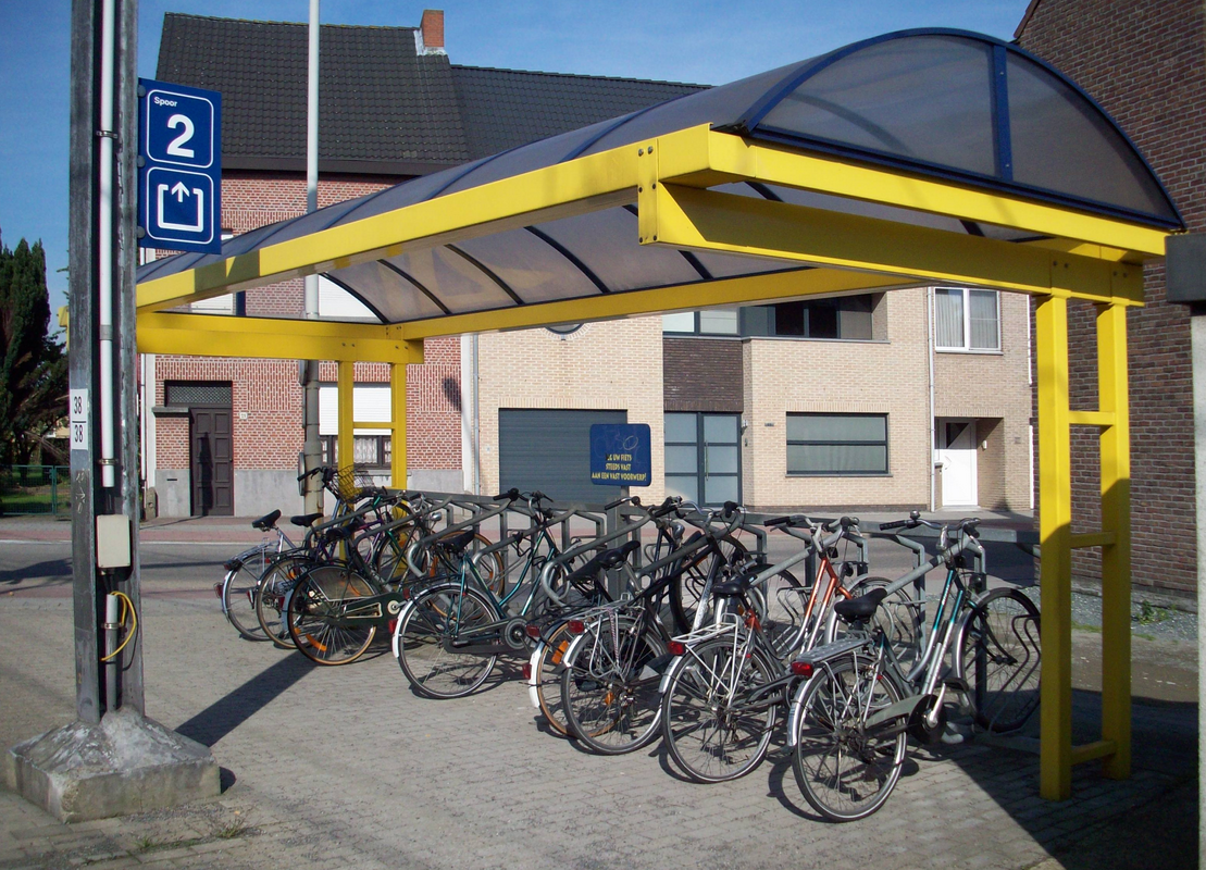 Station Schelle